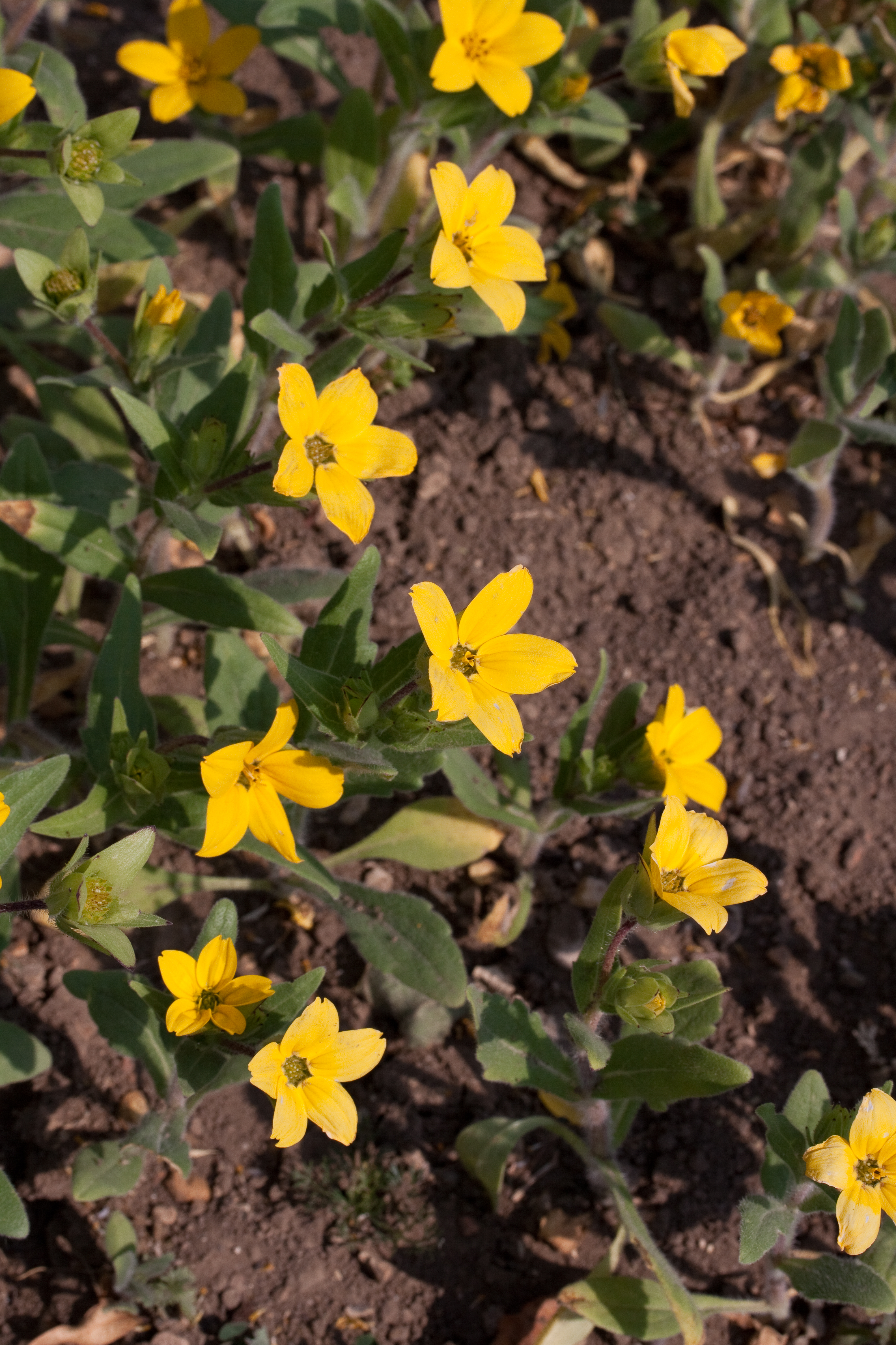 Floraison de Lindheimera texana - Jardin des Plantes - Paris